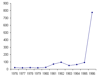 Tốc độ tăng giá bán lẻ hàng năm (tại thời điểm tháng 12 năm này so với tháng 12 năm kế trước) ở Việt Nam thời kỳ 1976-1986. Đơn vị tính: phần trăm. Số liệu dùng cho vẽ hình này lấy từ Bảng 4.10, trang 273, trong Trần Văn Thọ chủ biên (2000), Kinh tế Việt Nam 1955-2000: Tính toán mới, phân tích mới, Nhà xuất bản Thống kê, Hà Nội.